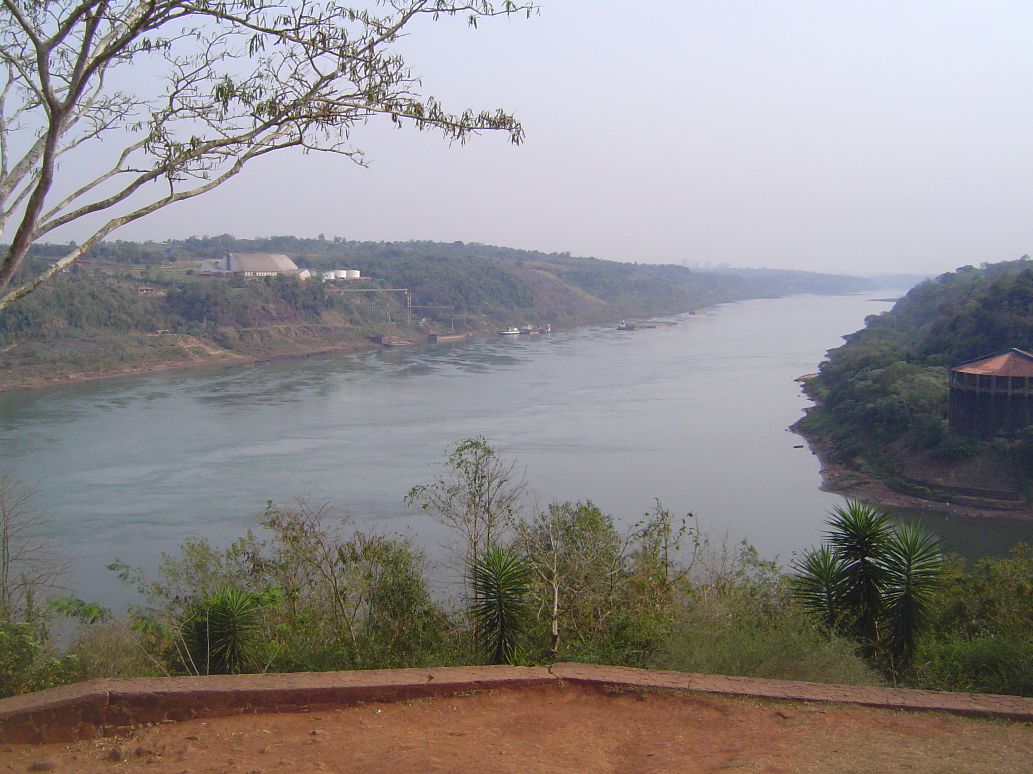 Triple Frontera entre Argentina, Brasil y Paraguay.